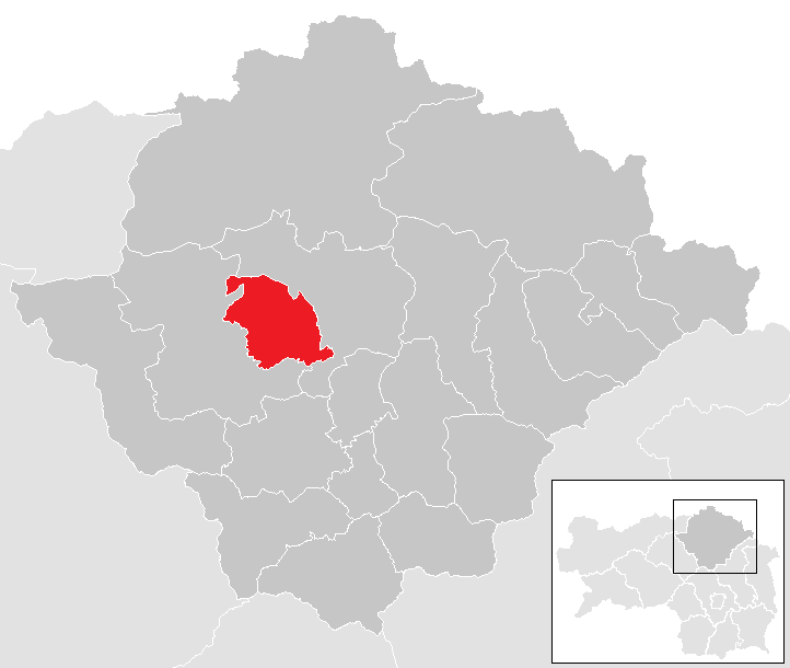 Lage von Aflenz im Bezirk Bruck-Mürzzuschlag